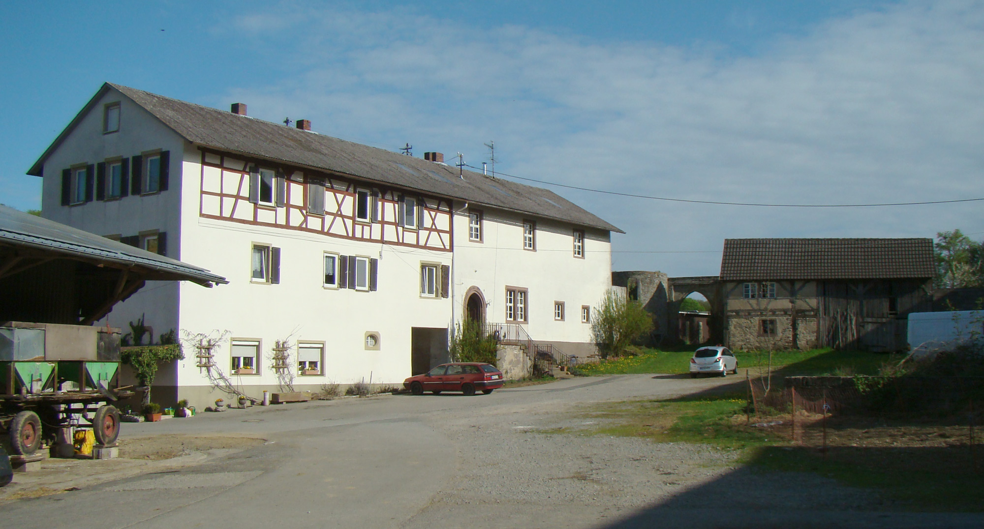 Ehem. Kloster Seligental bei Osterburken-Schlierstadt